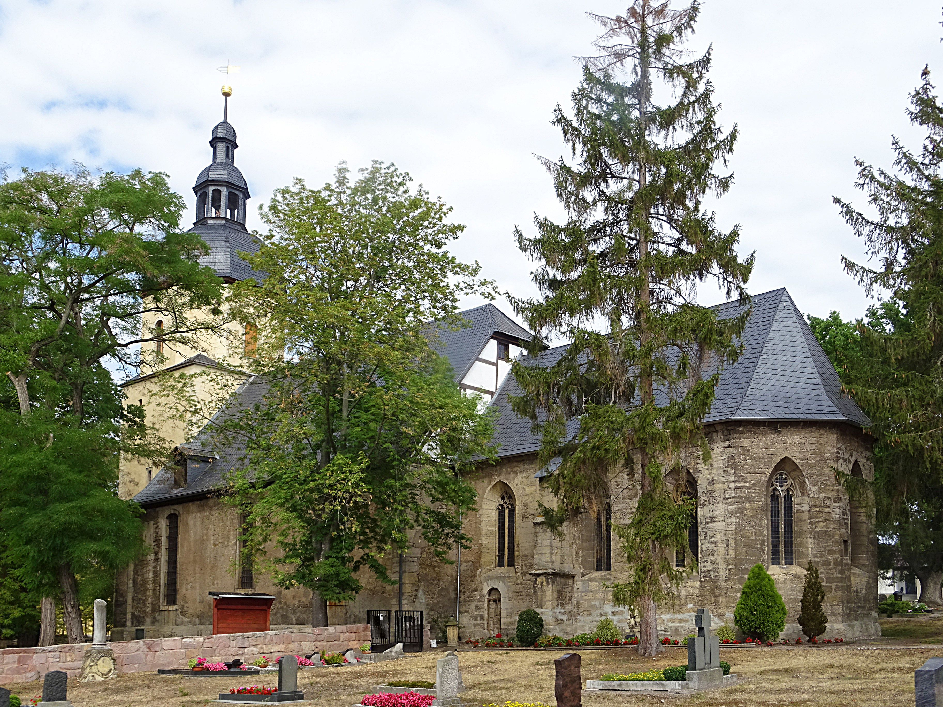 St. Petri-Pauli-Kirche (Günstedt) von Südosten